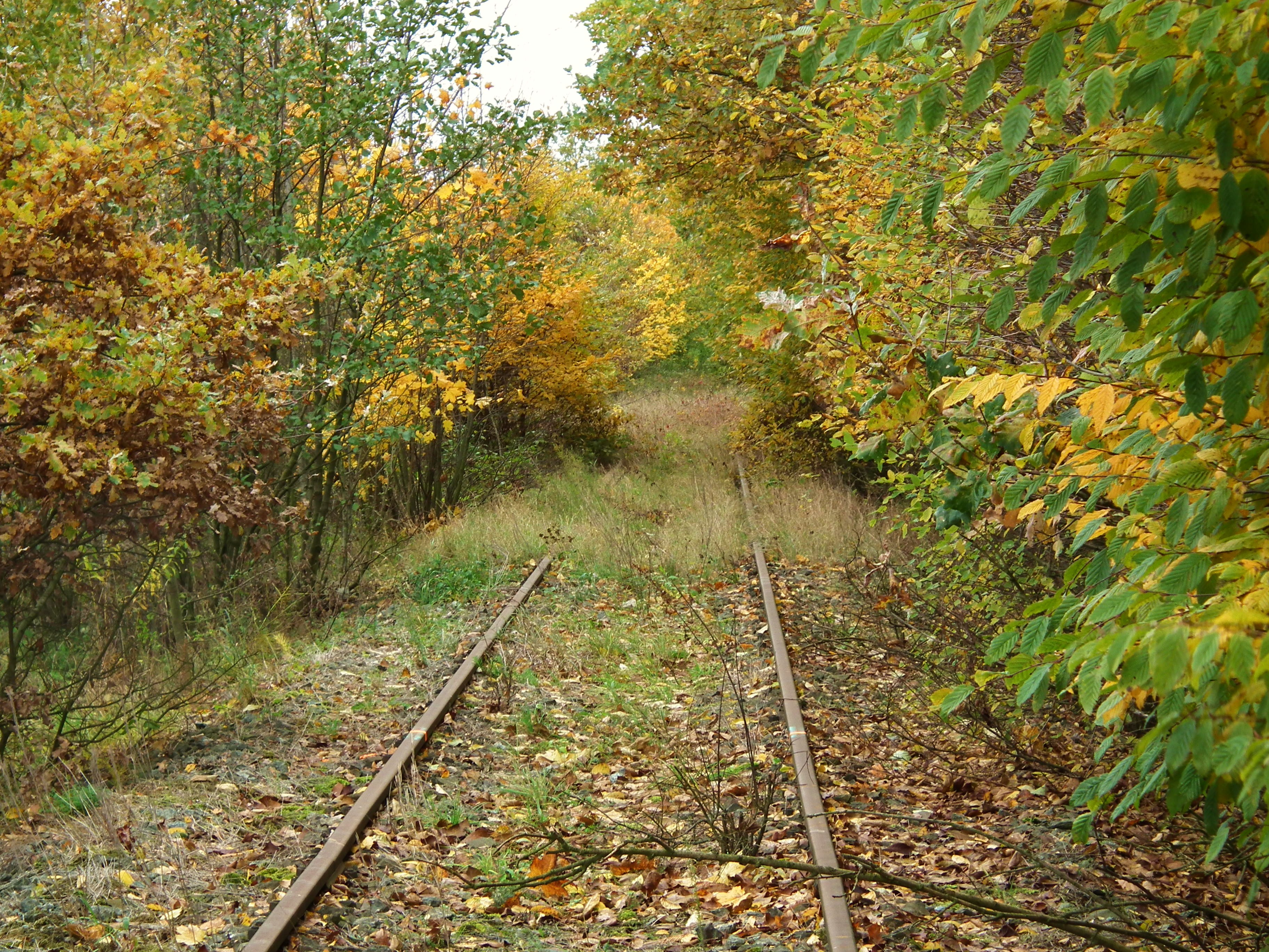 SA134-003 z pociągiem specjalnym Kolei Dolnośląskich podczas imprezy kolejowej Dolnośląskie Zakamrki III na liniach Dolnego Śląska i Łużyc. Stacja Pątnów Legnicki. Widok w kier. Prochowic.